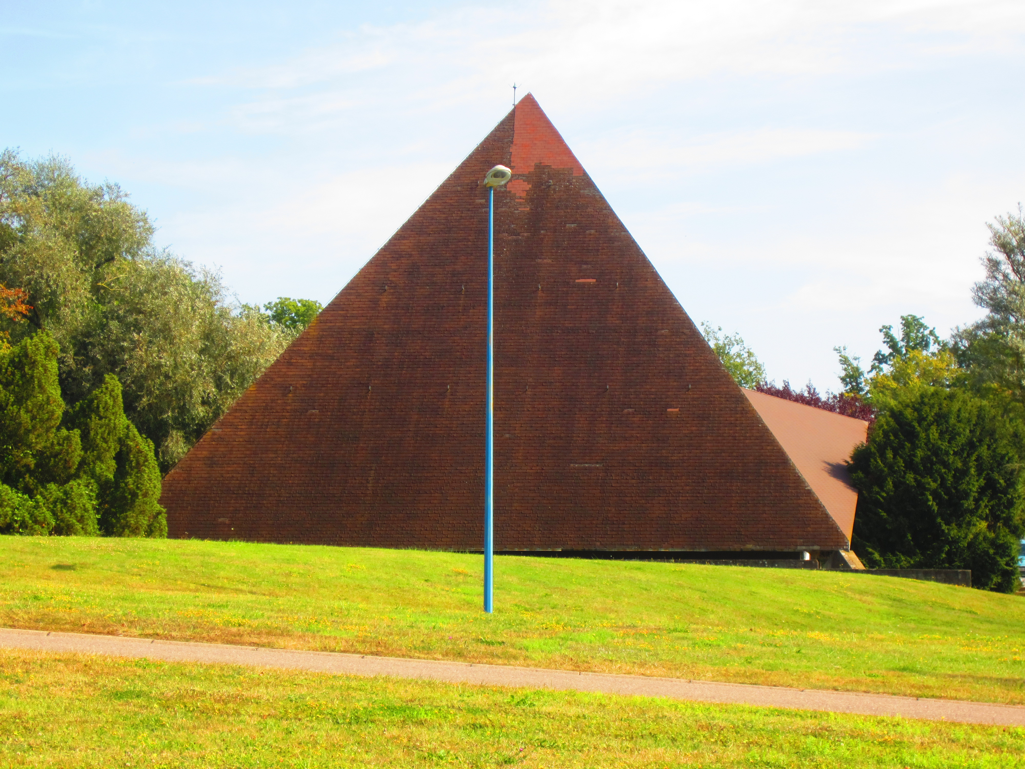 Chapelle Jury